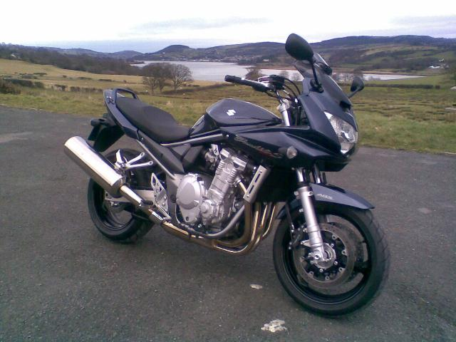 Suzuki Bandit 1250SA (07)